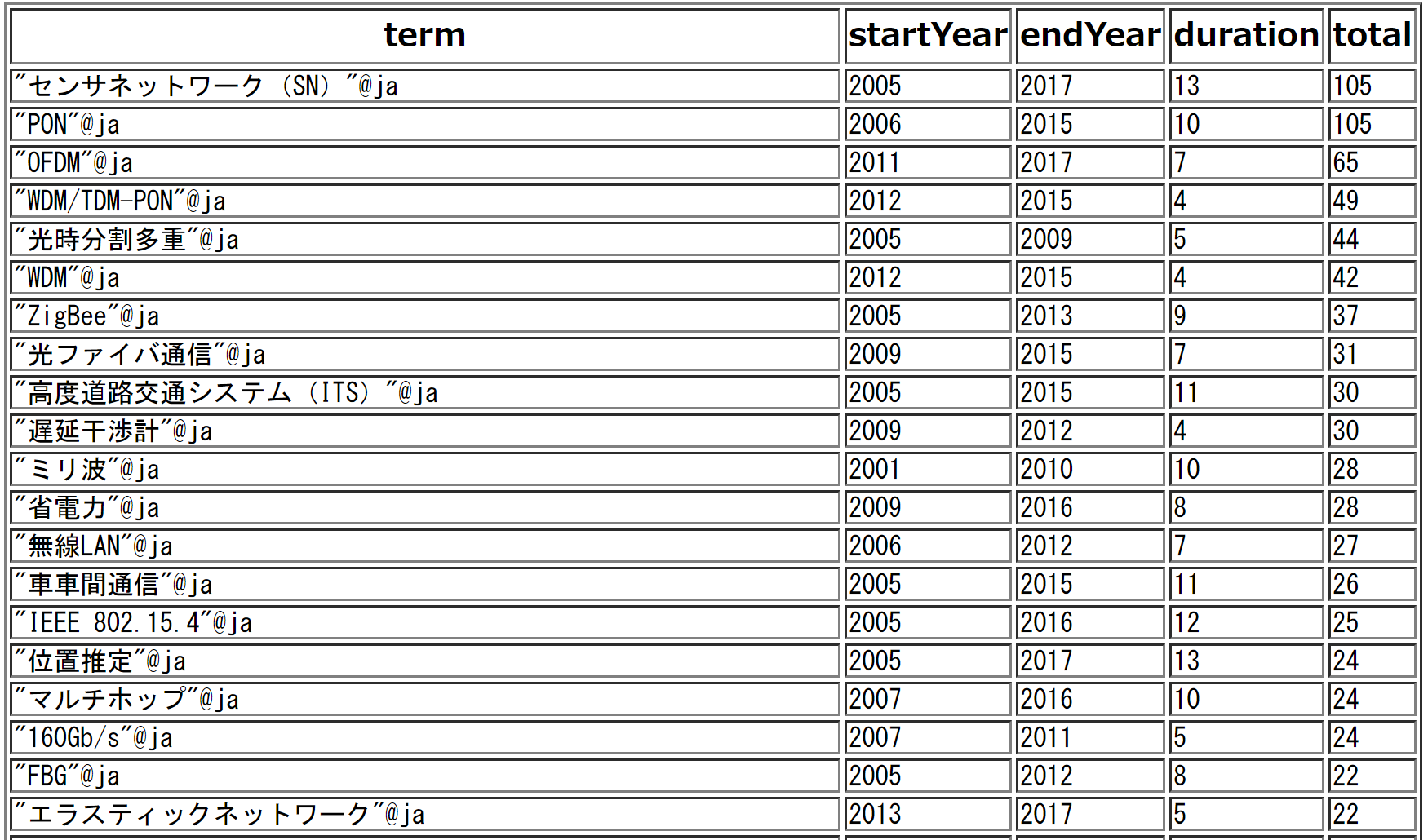 沖電気工業の研究開発歴